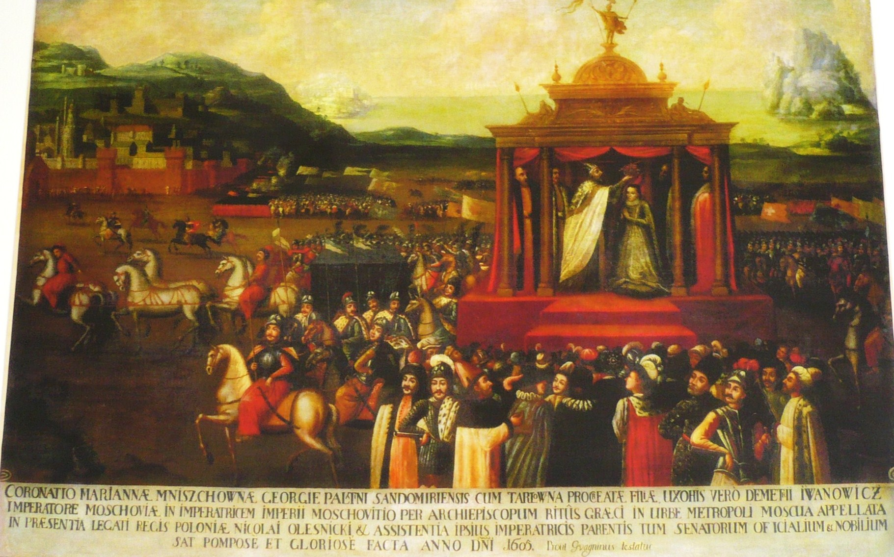 Wiśniowiec, obraz